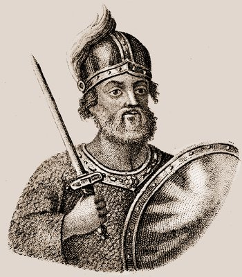 Ізяслав II Мстиславович